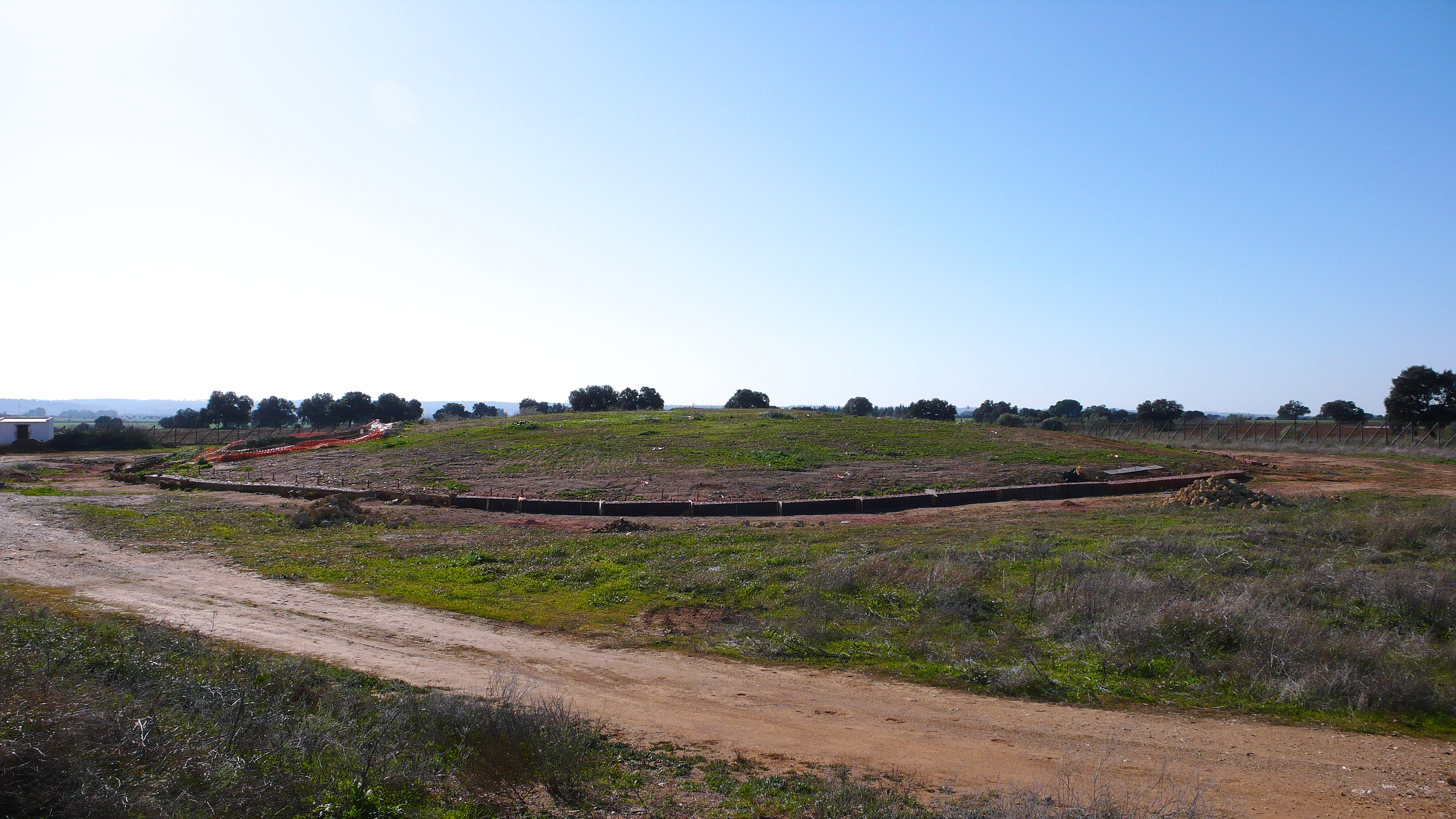 En la provincia de Huelva existen más de doscientos monumentos megalíticos. En el año 1922, Armando de Soto descubre este dolmen del Calcolítico. De tipología de "corredor largo" esta construído con ortostatos de granito, arenisca y pizarra. Actualmente el yacimiento se encuentra en fase de restauración.